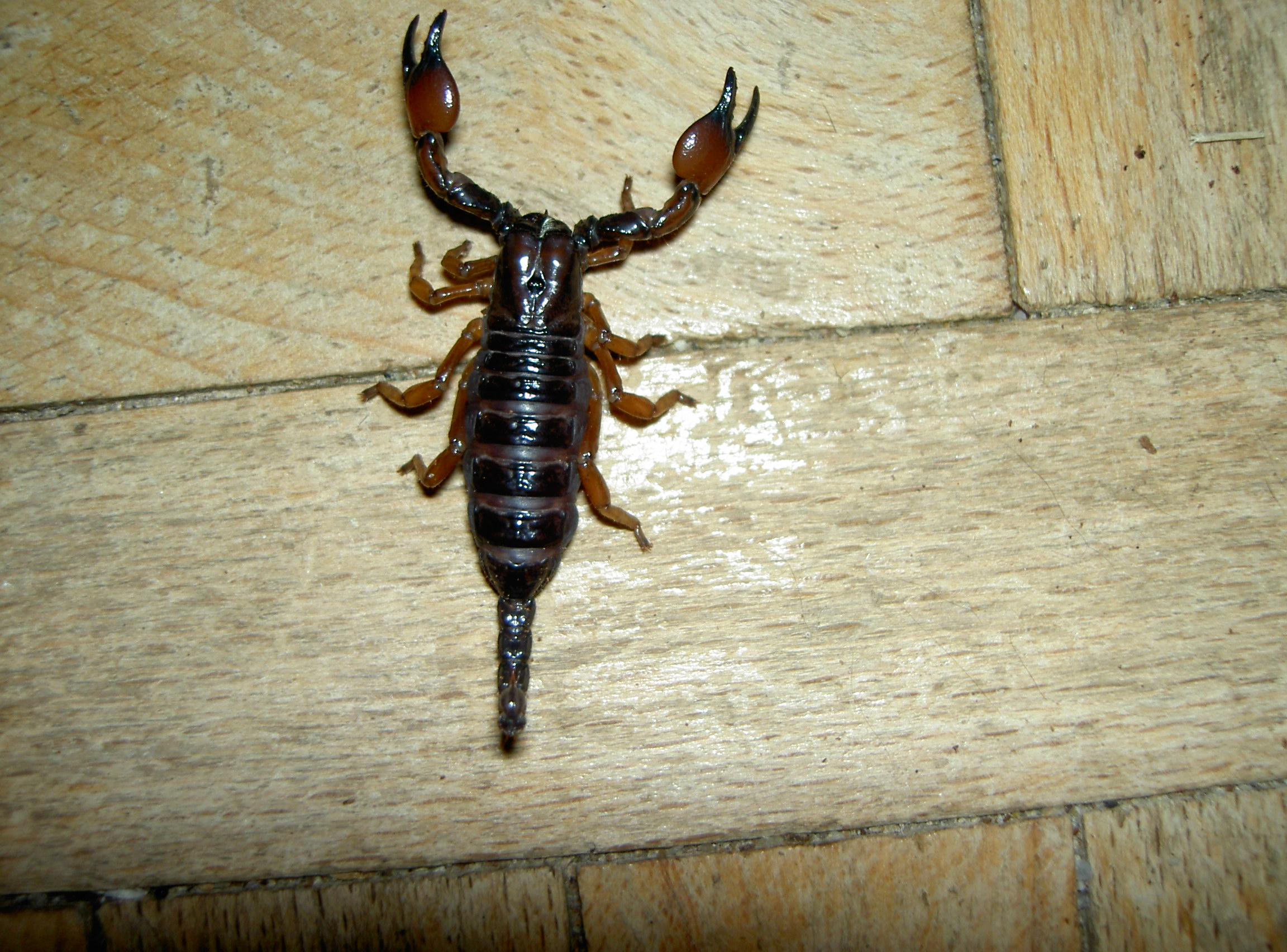 Pandinus cavimanus